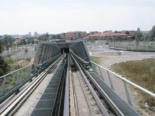 Tuluza, torowisko VAL. Dwie szyny prowadzące po bokach, dwie płaskie szyny, po których toczą się koła na oponach oraz piąta płaska szyna "powrotna".